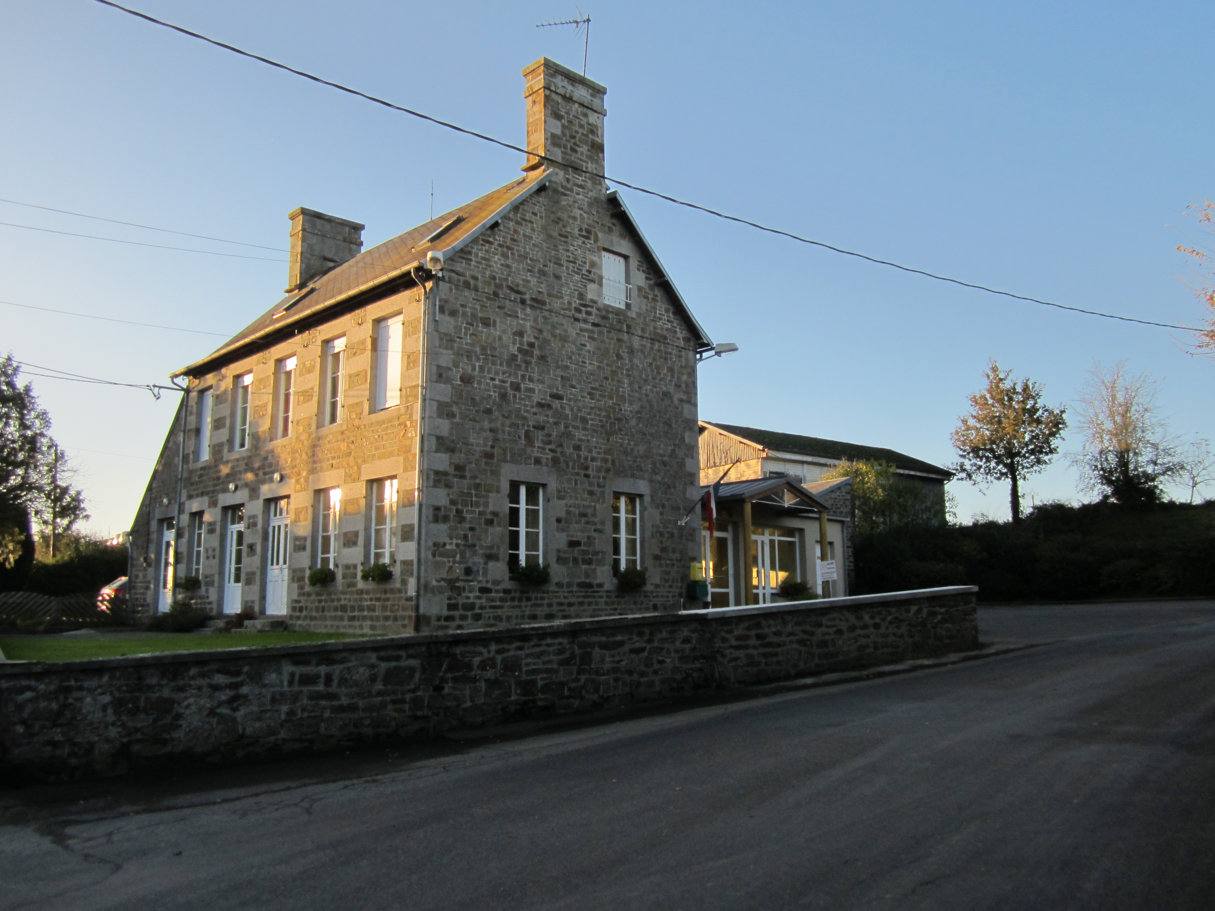 Vernix, Manche